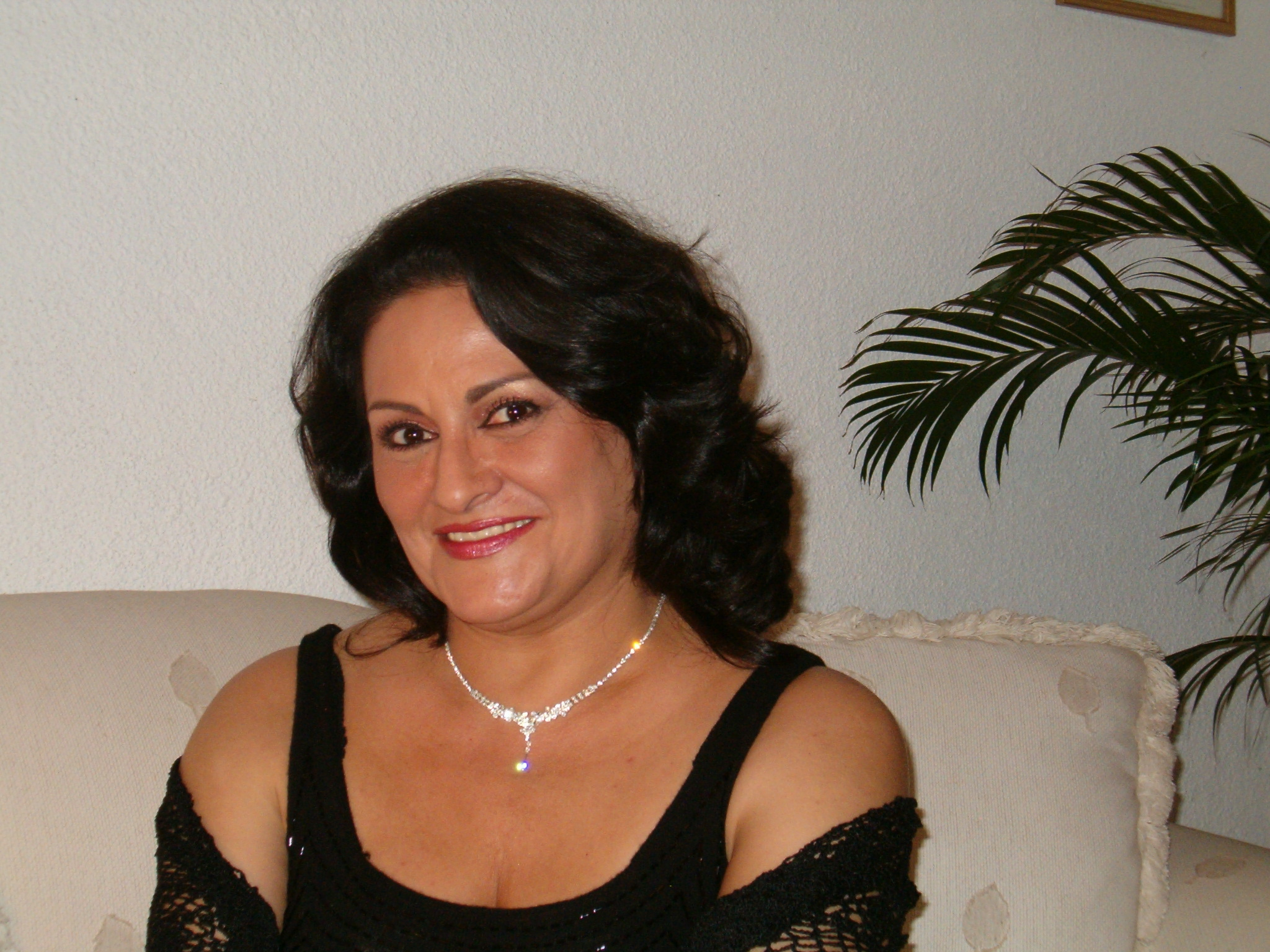 Cristina Altamira, mezzosoprano